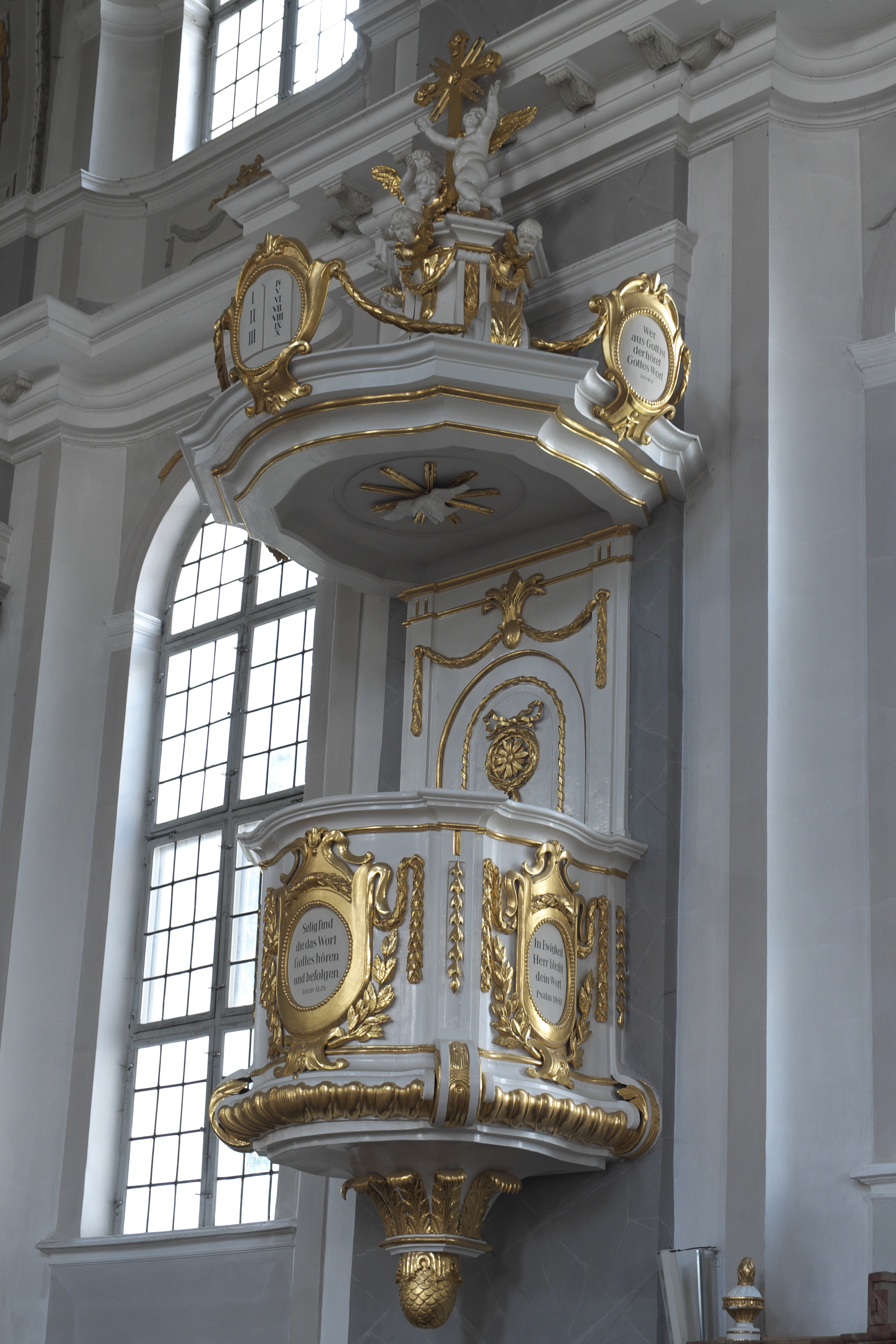 Katholische Pfarrkirche Mariä Heimsuchung in Lechbruck am See im Landkreis Ostallgäu (Bayern/Deutschland), Kanzel